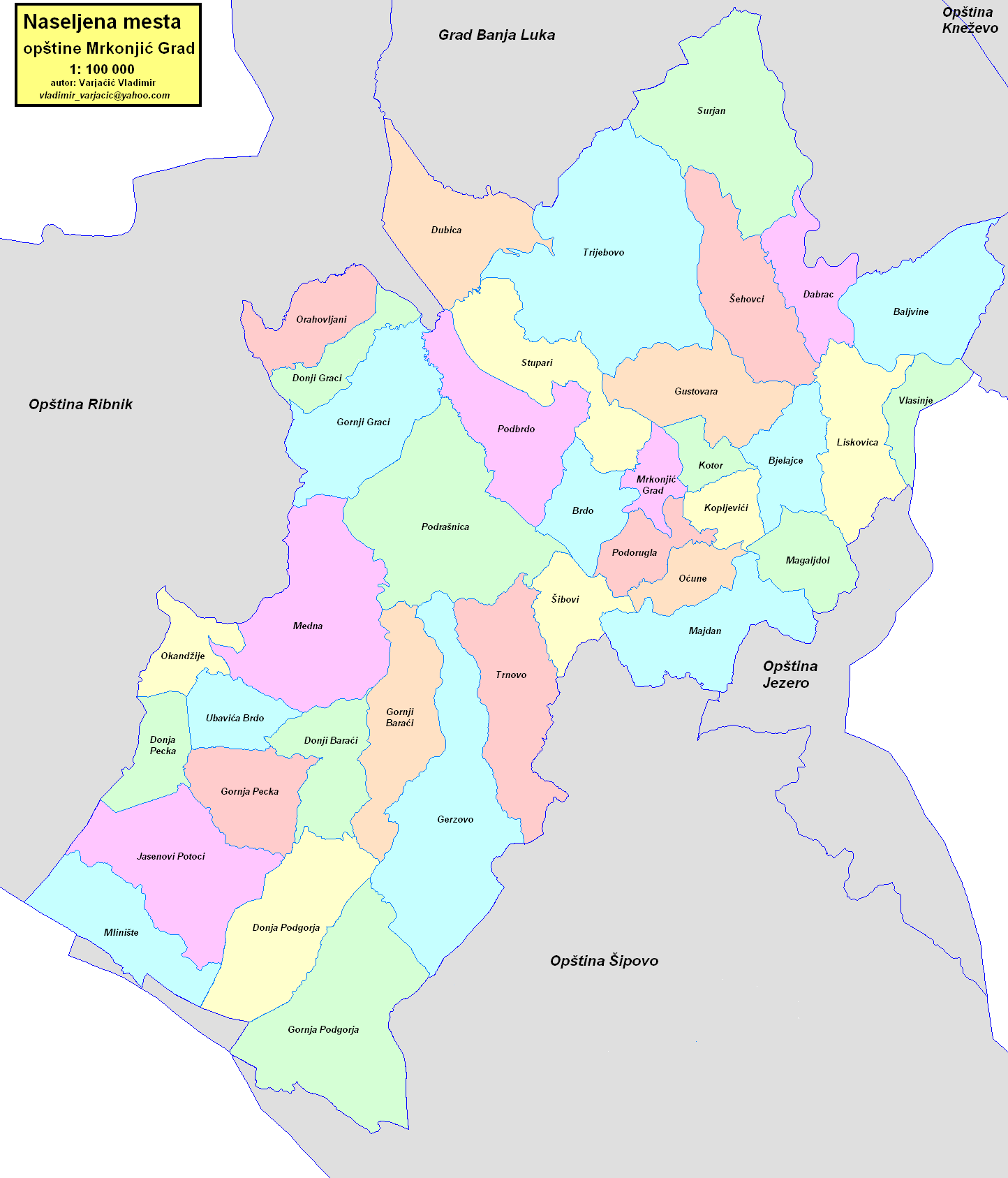 Opština Mrkonjić Grad